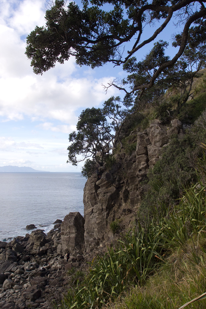 Ti Point